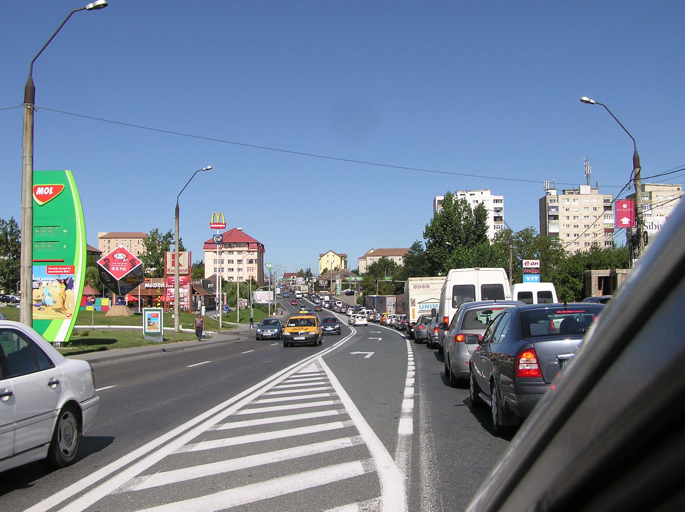 Die Europastraße 68/81 durch Hermannstadt / Sibiu, Rumänien.